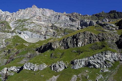 Blick zum Dündenhorn vom Oberbärgli aus